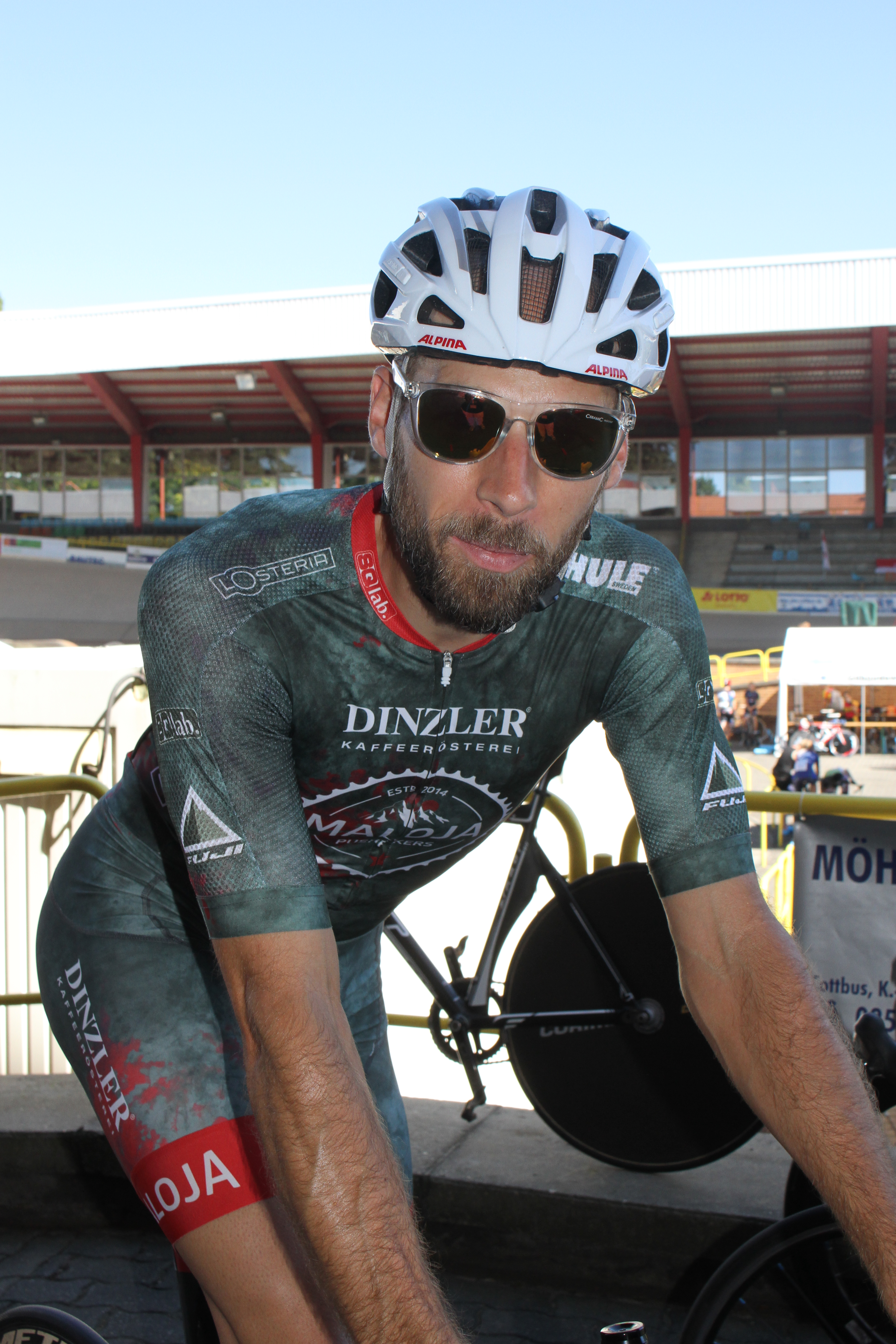 Christian Grasmann, deutscher Radsportler